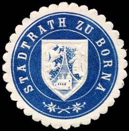 Sealing stamp Title: Stadtrath zu Borna Description: blau, weiß, geprägt Place: Borna size: 4 cm